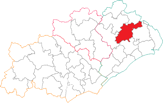 Situation du canton dans le département de l'Hérault.